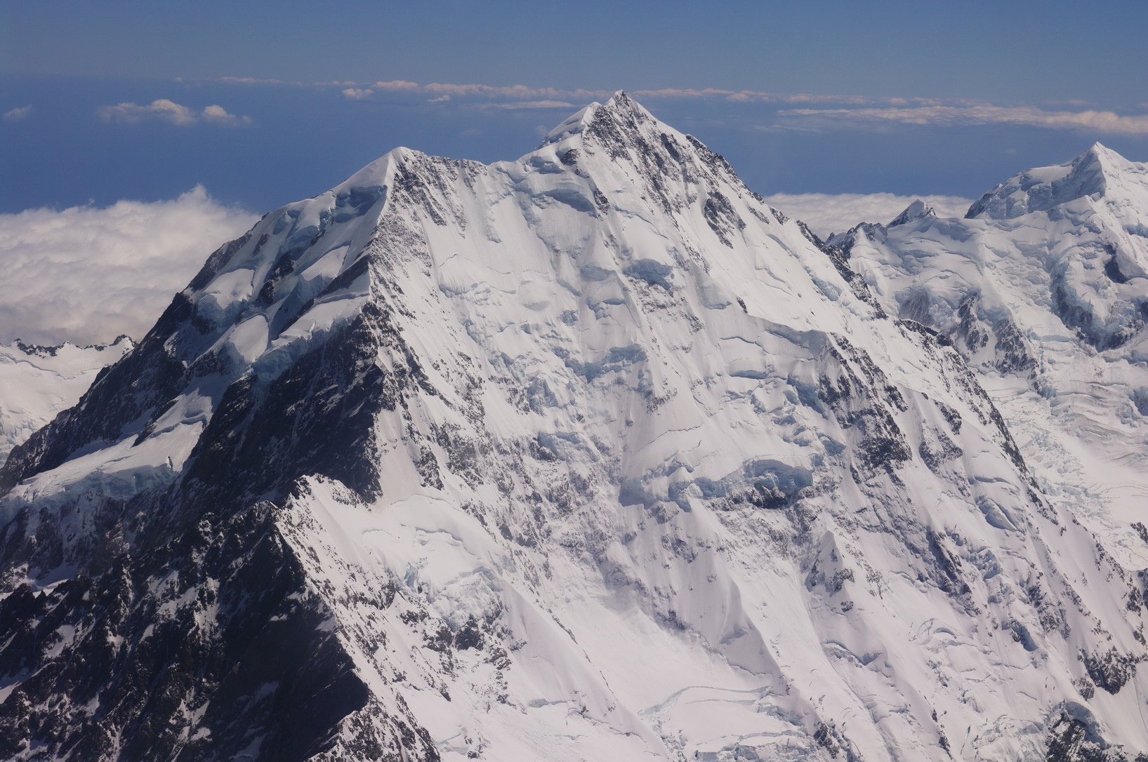 Aoraki Mount Cook aus der Luft